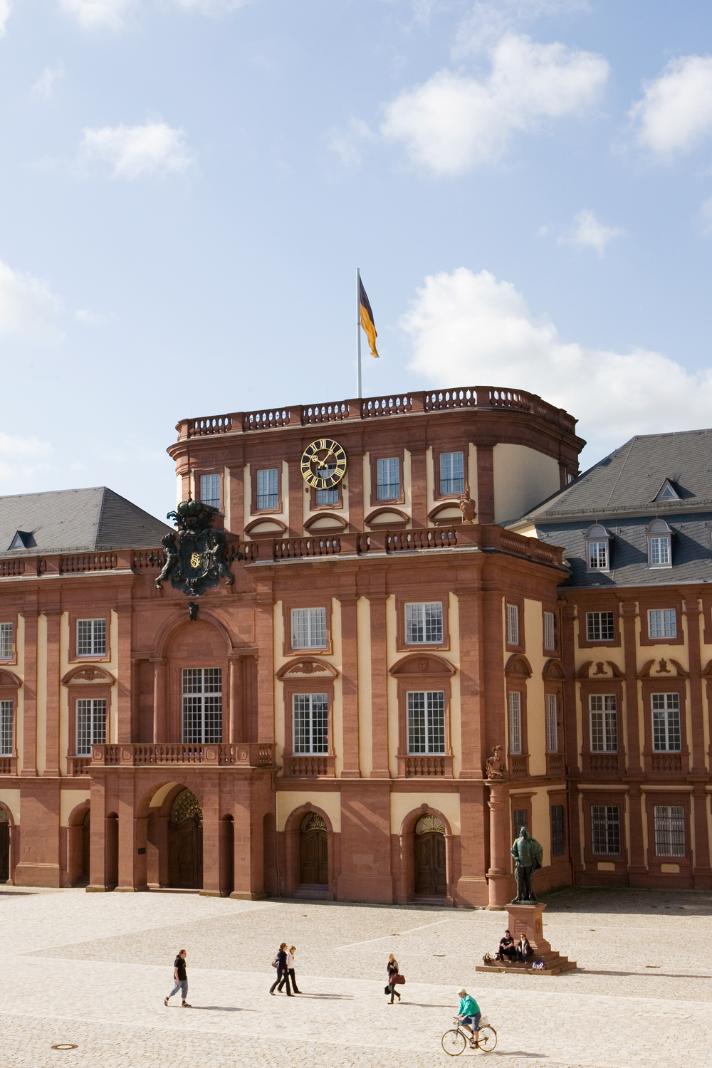 Schloss Mannheim (Mittelbau), Sitz der Universität Mannheim